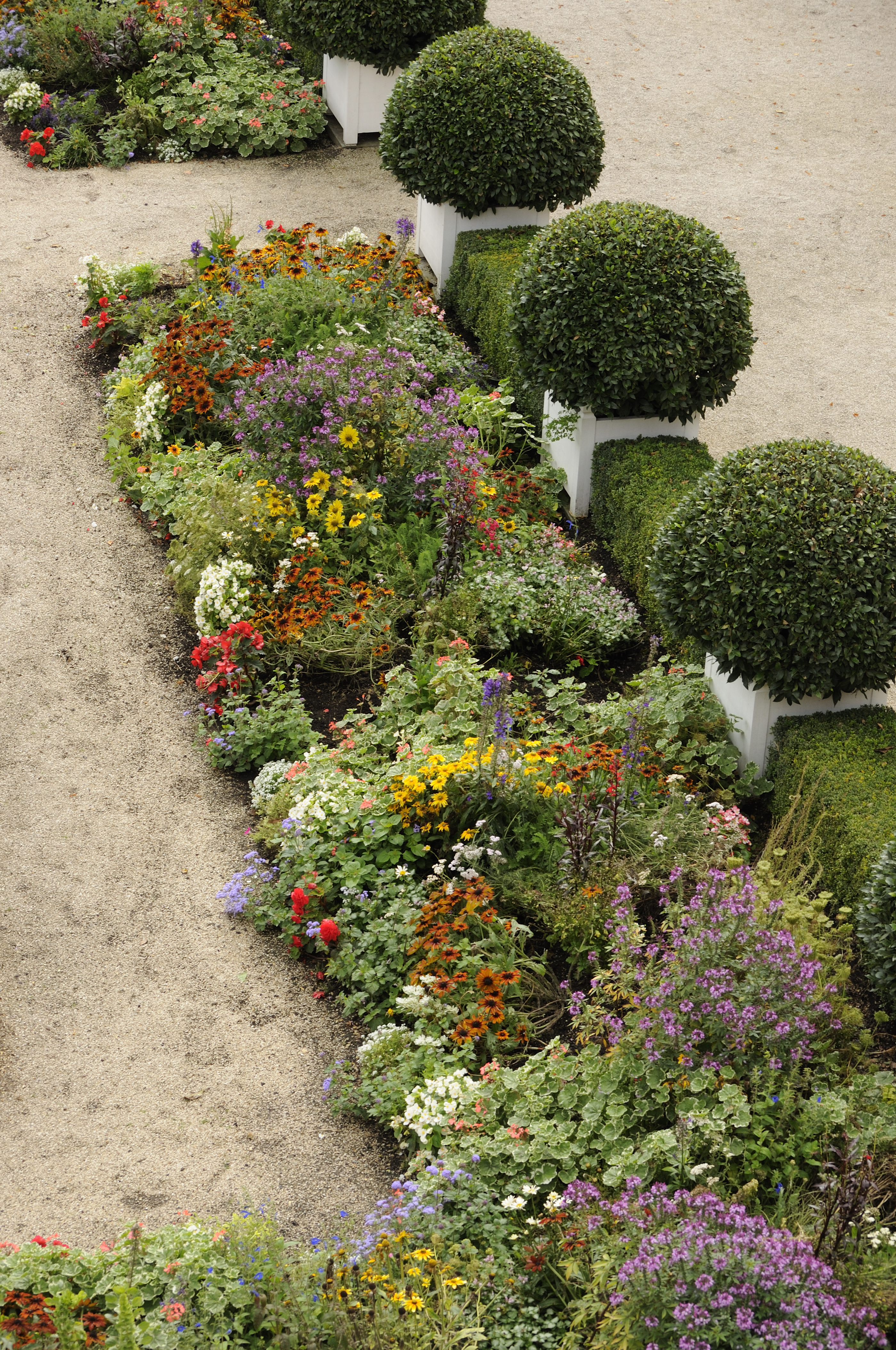 Dieses Foto entstand im Rahmen des Projekts Wiki Loves Monuments Mittelhessen, das aus dem Community-Projektbudget von Wikimedia Deutschland e. V. gefördert wurde.